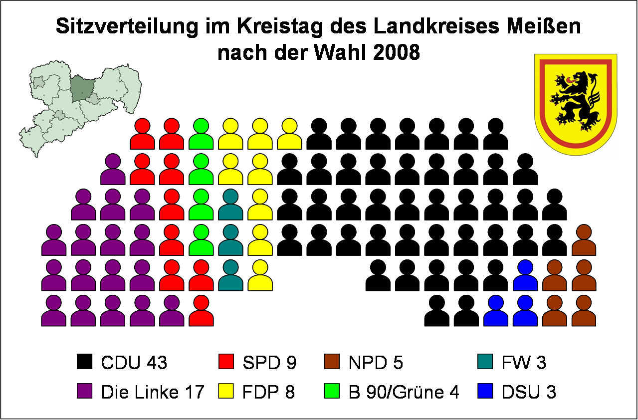 Sitzverteilung im Kreistag des Landkreises Meißen nach der Wahl vom 8. Juni 2008